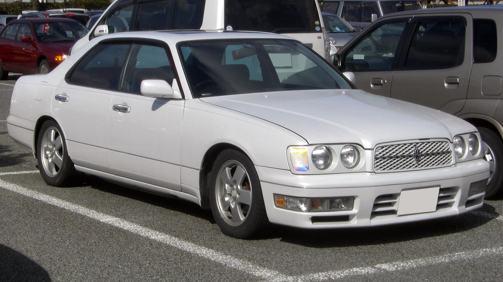 日産・セドリック（Y32型）